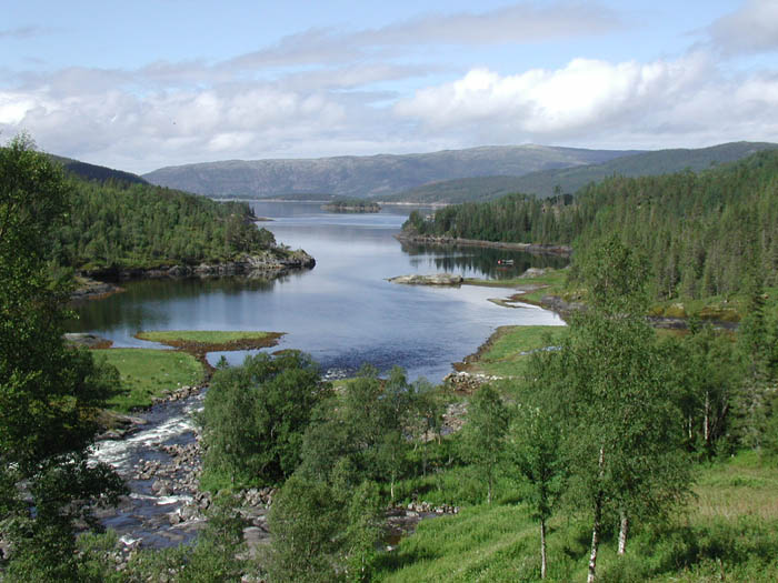 Sjøørret og laksefiske ved Sagmestereidet